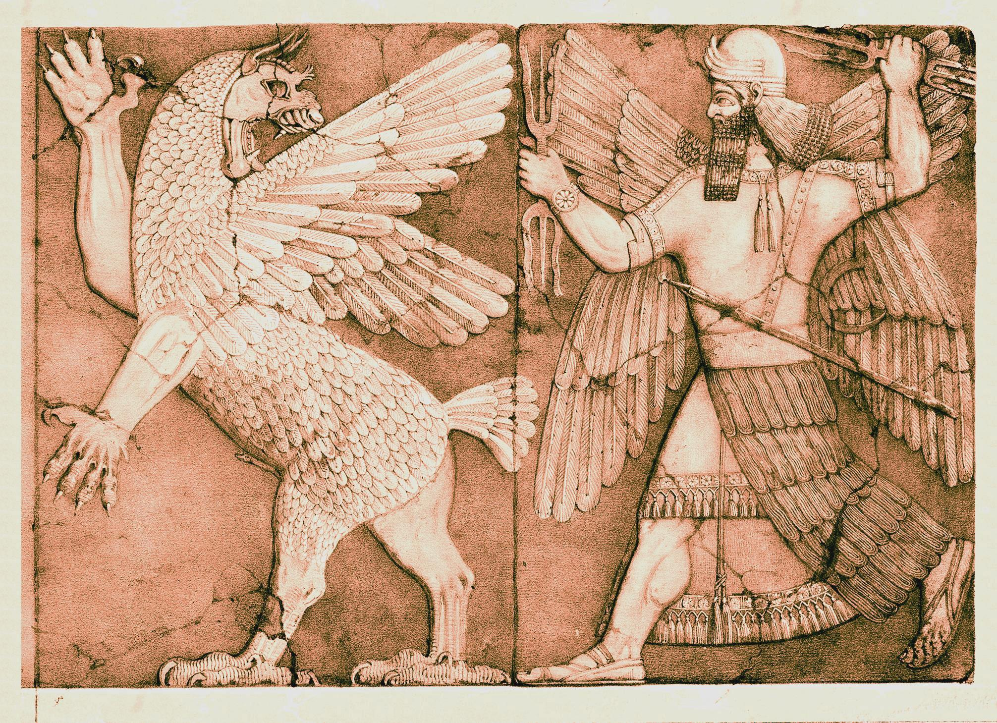 Il dio Ninurta e il mostro Chaos